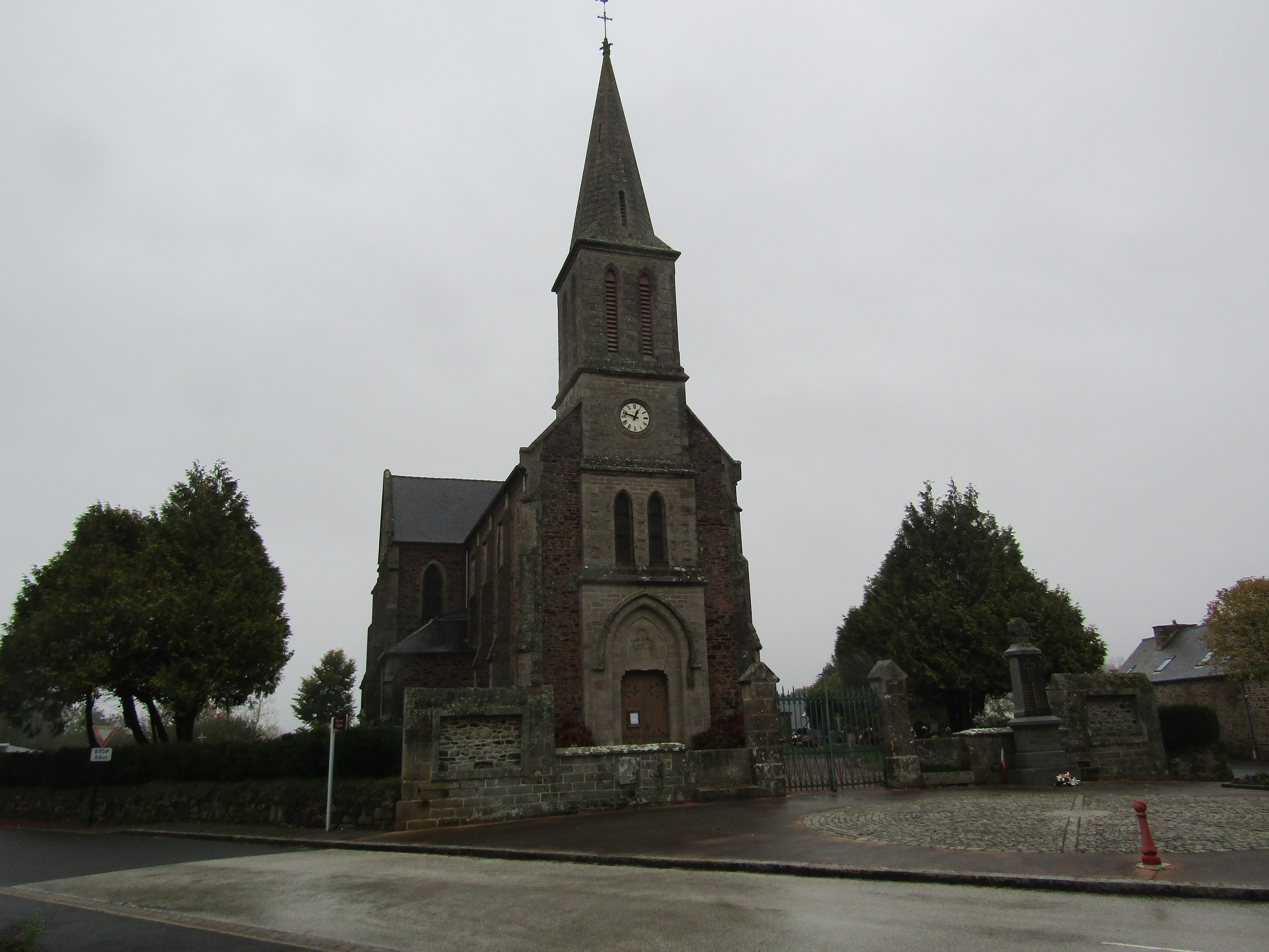 Église Saint-Pierre de Quintenic